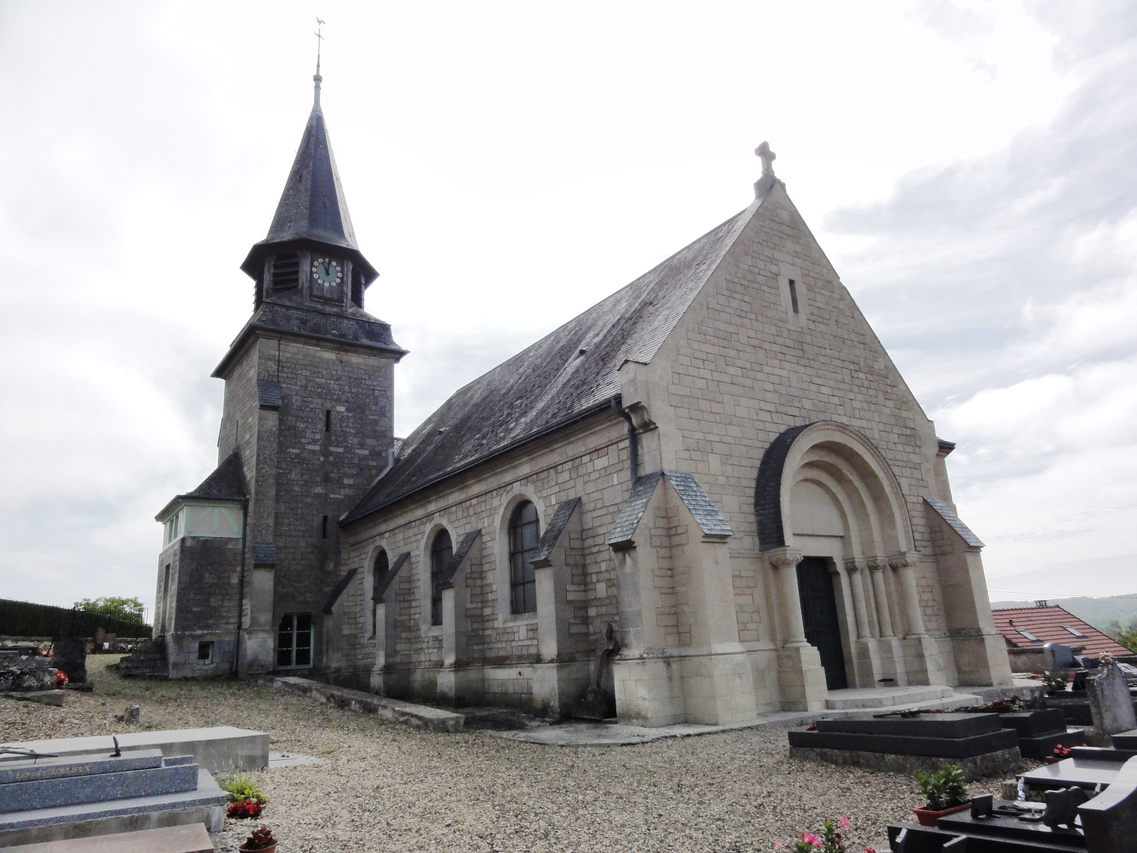 Vassogne (Aisne) église